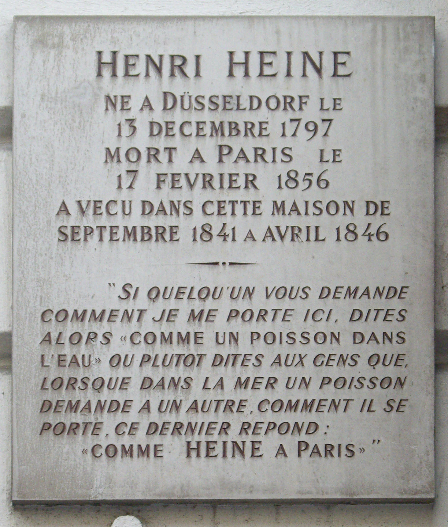 Plaque commémorative, 72 rue du Faubourg-Poissonnière, Paris 10e.« Henri Heine, né à Düsseldorf le 13 décembre 1797, mort à Paris le 17 février 1856, a vécu dans cette maison de septembre 1841 à avril 1846.« Si quelqu’un vous demande comment je me porte ici, dites alors : "Comme un poisson dans l’eau", ou plutôt dites aux gens que, lorsque dans la mer un poisson demande à un autre comment il se porte, ce dernier répond : "Comme Heine à Paris". »